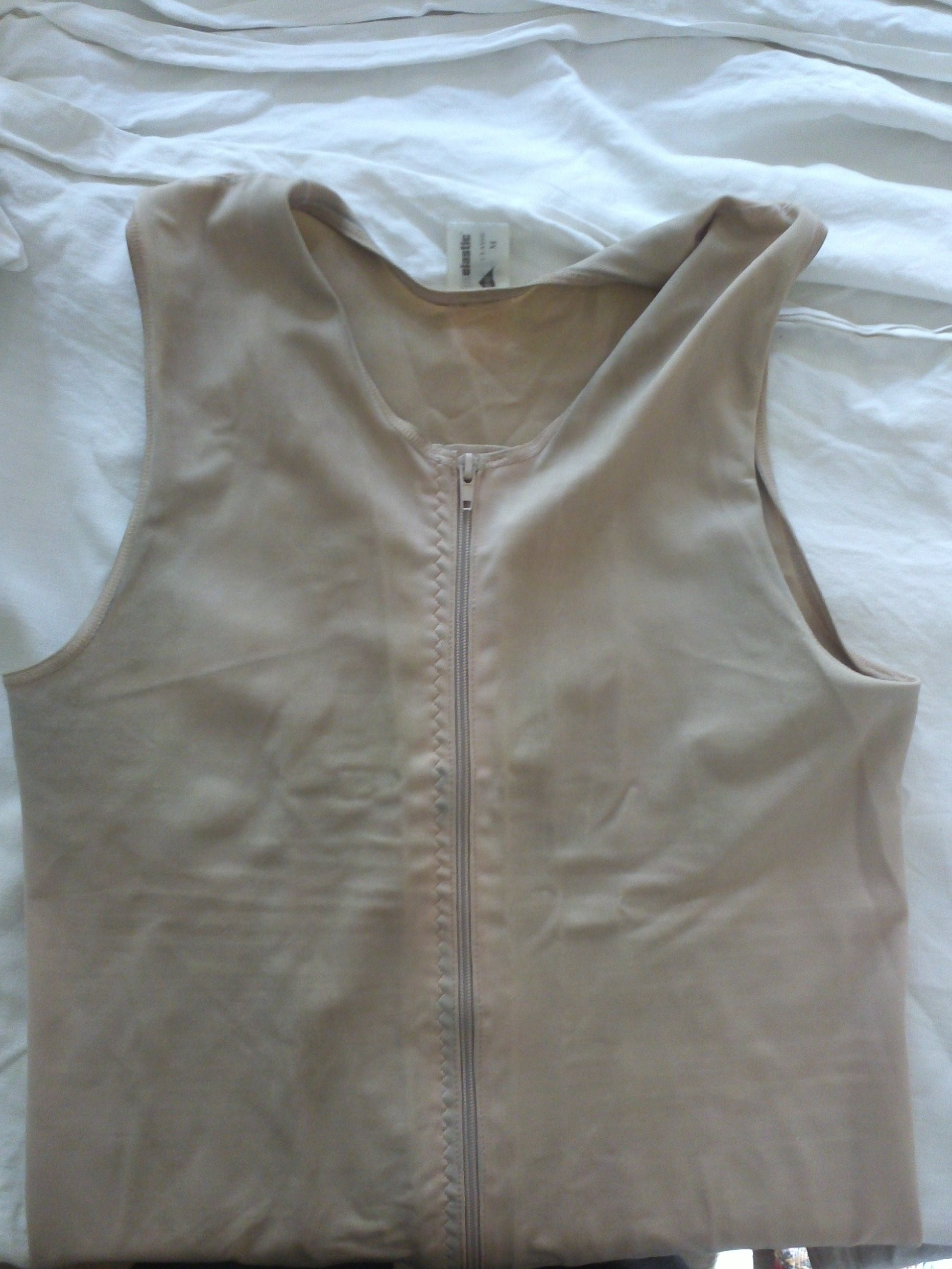 Elastane jacket.